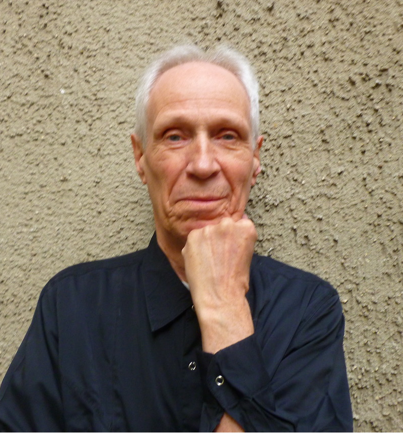 Portrait von Ekkehard Stoevesand